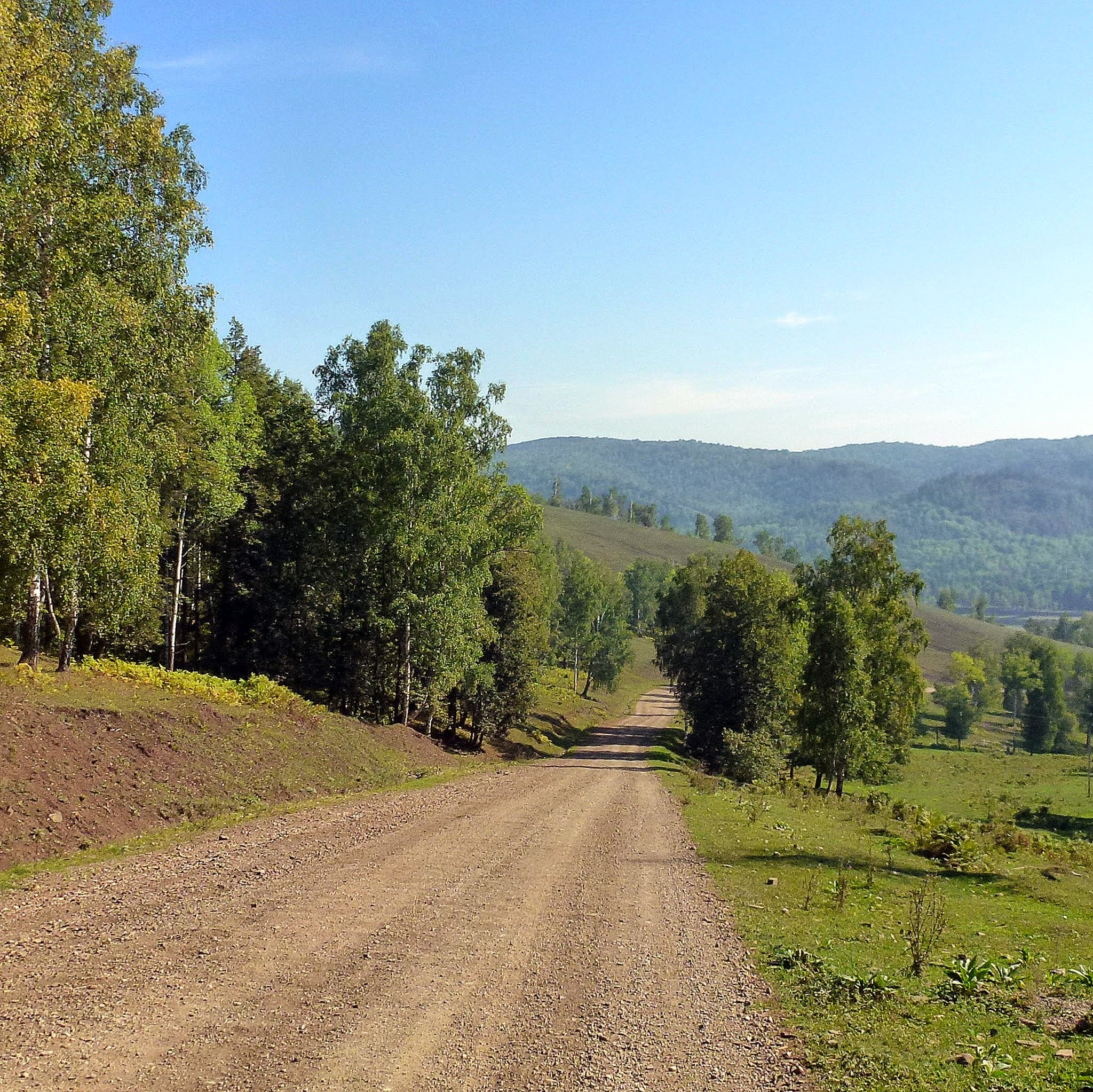 Национальный парк «Башкирия»